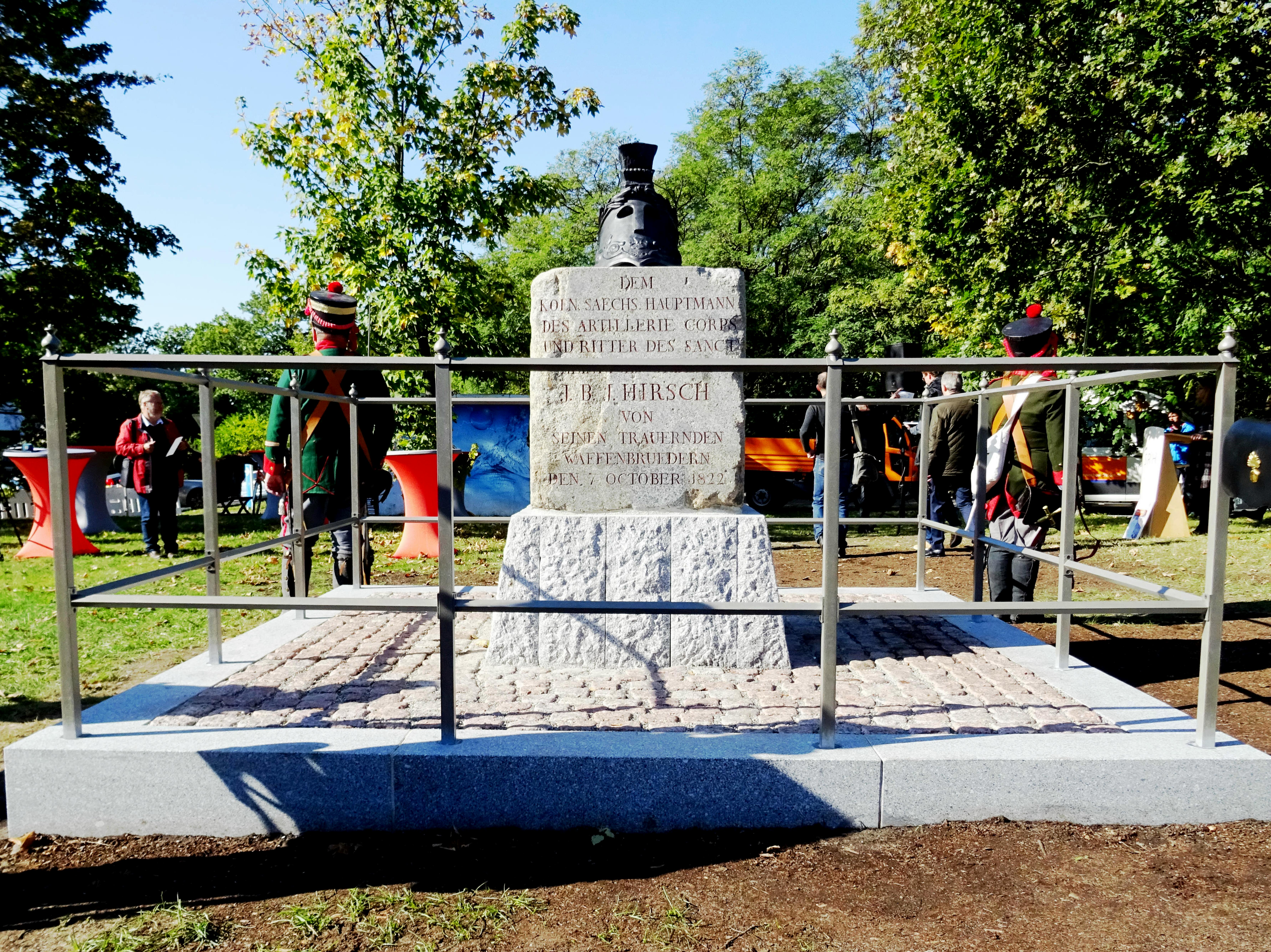 Dresden, Hauptmann Hirsch-Denkmal. Einweihung am 07. Oktober 2019. Maßgeblichen Anteil haben die Firmen Berufliche Trainingszentren Dresden der SRH Berufsbildungswerk Sachsen GmbH Dresden, Steinbildhauer- und Steinmetzwerkstatt Andreas Hempel mit ausführenden Bildhauerleistungen und der Kunstgießerei Gebr. Ihle und weitere.Weitere Förderer sind das Landesamt für Denkmalpflege Sachsen, der St. Heinrichs Orden zu Bamberg e.V. und das Militärhistorische Museum der Bundeswehr. Die Sponsoren stellten rund 30.000 Euro zur Verfügung. Hinzu kommen noch die Eigenleistung von über eintausend Teilnehmerstunden. Königlich-sächsischen Artillerieeinheit flankiert das Denkmal.